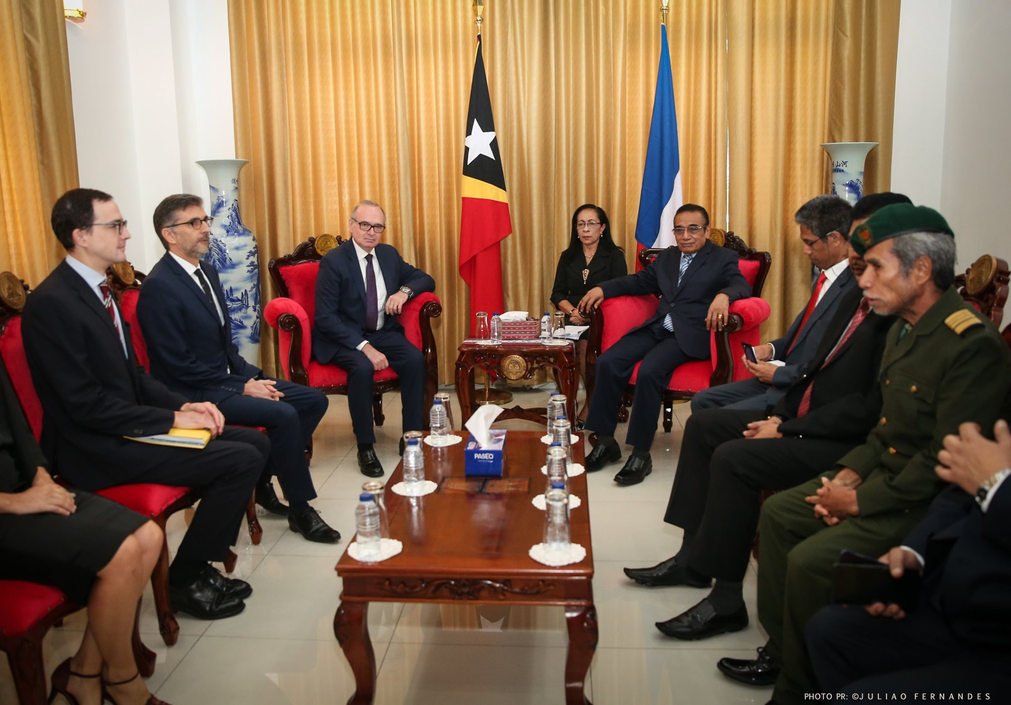 Olivier Chambard, französischer Botschafter in Osttimor, am Tag der Übergabe seiner Akkreditierung, mit Staatspräsident Francisco Guterres